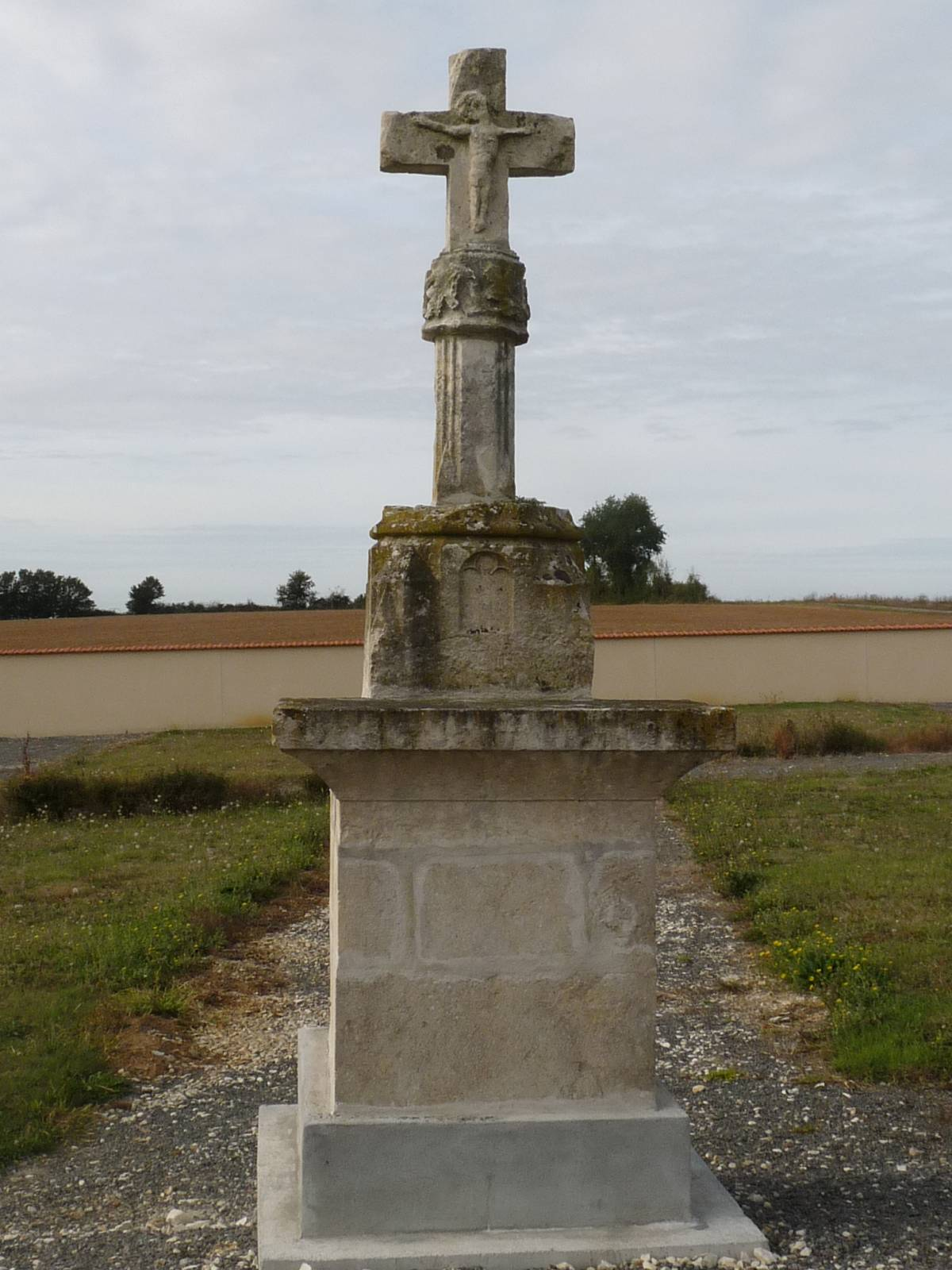 croix 15è siècle dans le cimetière de Chassiecq, Charente, France